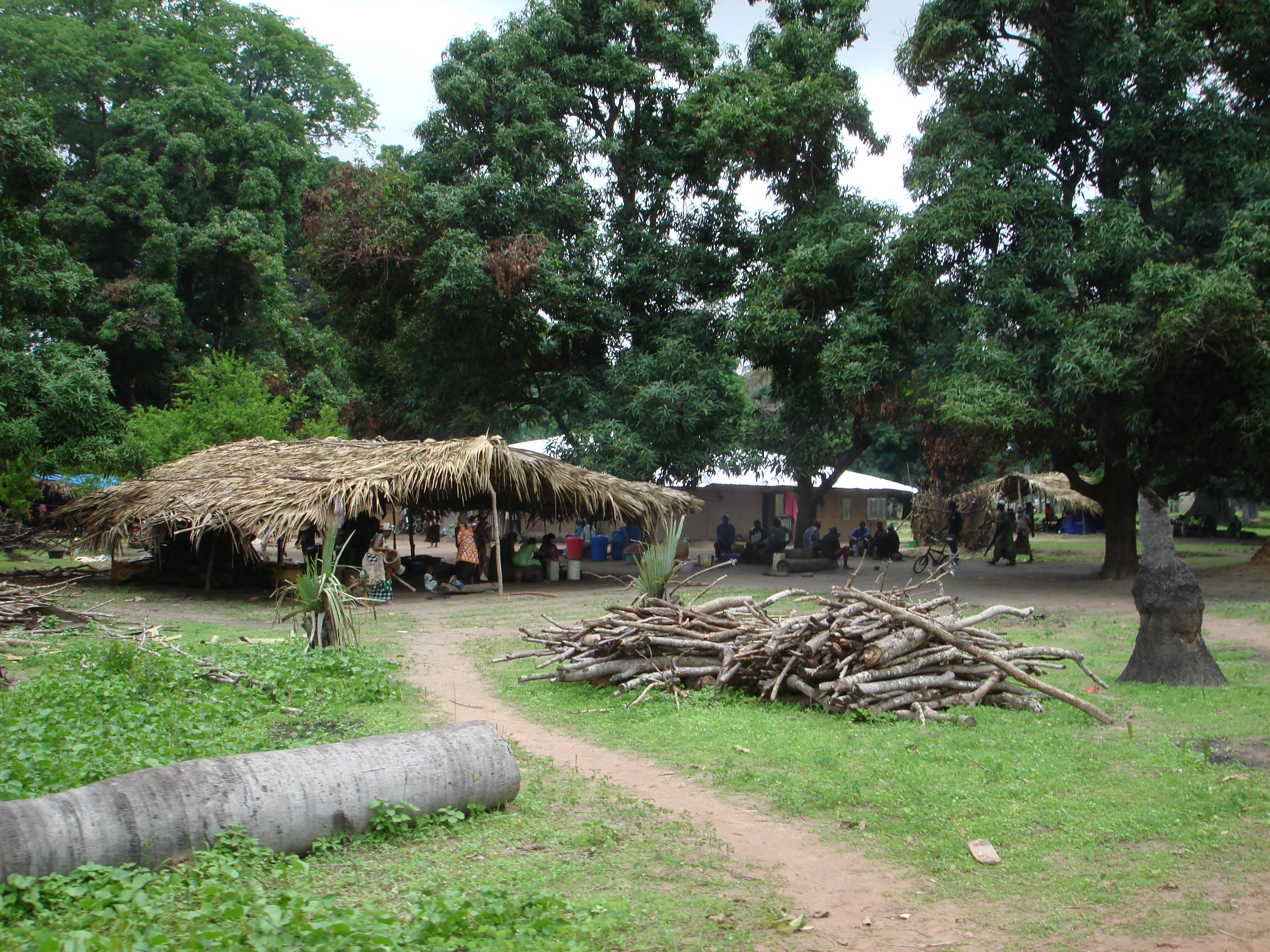 Le village de Baïla en Casamance (Sénégal)